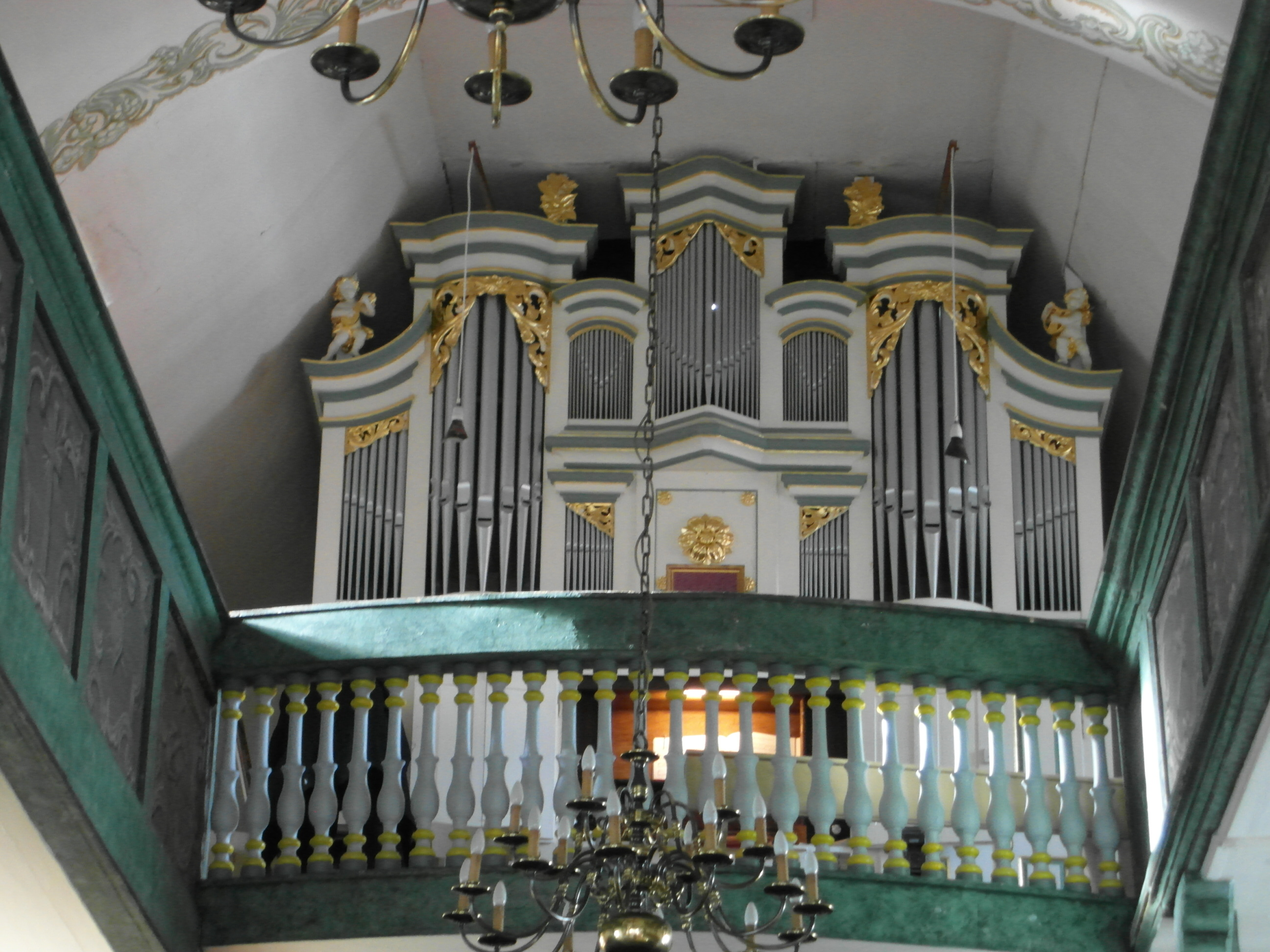 Die Orgel der Gospiterodaer Kirche wurde 1741 erbaut vom Orgelbaumeister Carl Christian Hoffmann, Gotha, restauriert im Jahr 1994 vom Orgelbaumeister Rudolf Böhm aus Gotha.